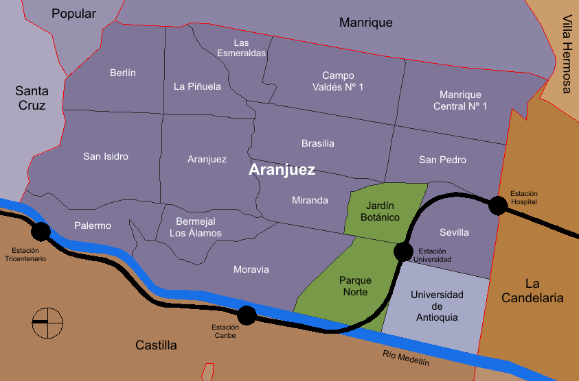 mapa de la división barrial de la comuna. Medellín, Colombia.